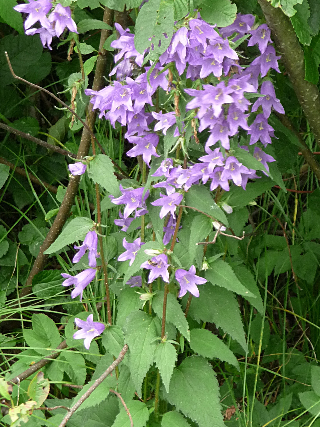 Nesselblättrige Glockenblume bei Bärnzell